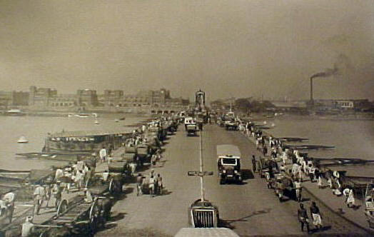 Calcutta, historical sight